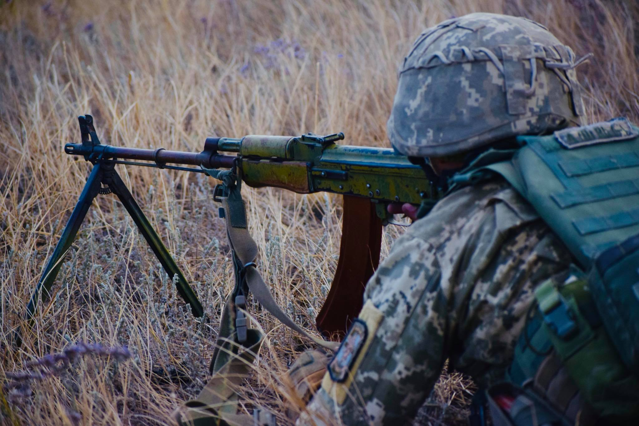 Навчання командування ВМС ЗС України «Шторм – 2018»: дії артилерії, авіації та інженерних підрозділів під час оборони морського узбережжя В рамках спільного командно-штабного навчання Командування Військово-Морських Сил ЗС України з іншими військовими формуваннями та правоохоронними органами “Шторм 18” було проведено операцію щодо оборони морського узбережжя. Окремий артилерійський дивізіон національних ВМС здійснив вогневе ураження морських цілей артилерійськими системами гаубичного типу Д-20. Інженерні підрозділи виконали завдання з облаштування протидесантних мінних загороджень та аерозольного маскування вогневих позицій, а морська авіація виконала бомбометання. Варто зазначити, що злагоджені дії задіяних військ (сил) показали налагоджену роботу командного пункту управління навчання та підвищення взаємосумісності з іншими органами управління. Прес-центр Командування ВМС ЗС України